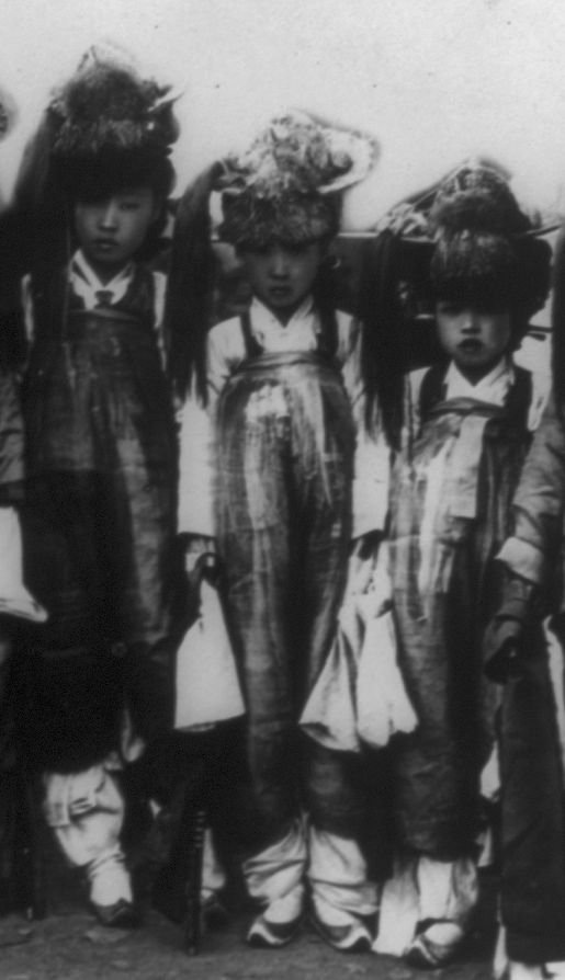 Kisaeng